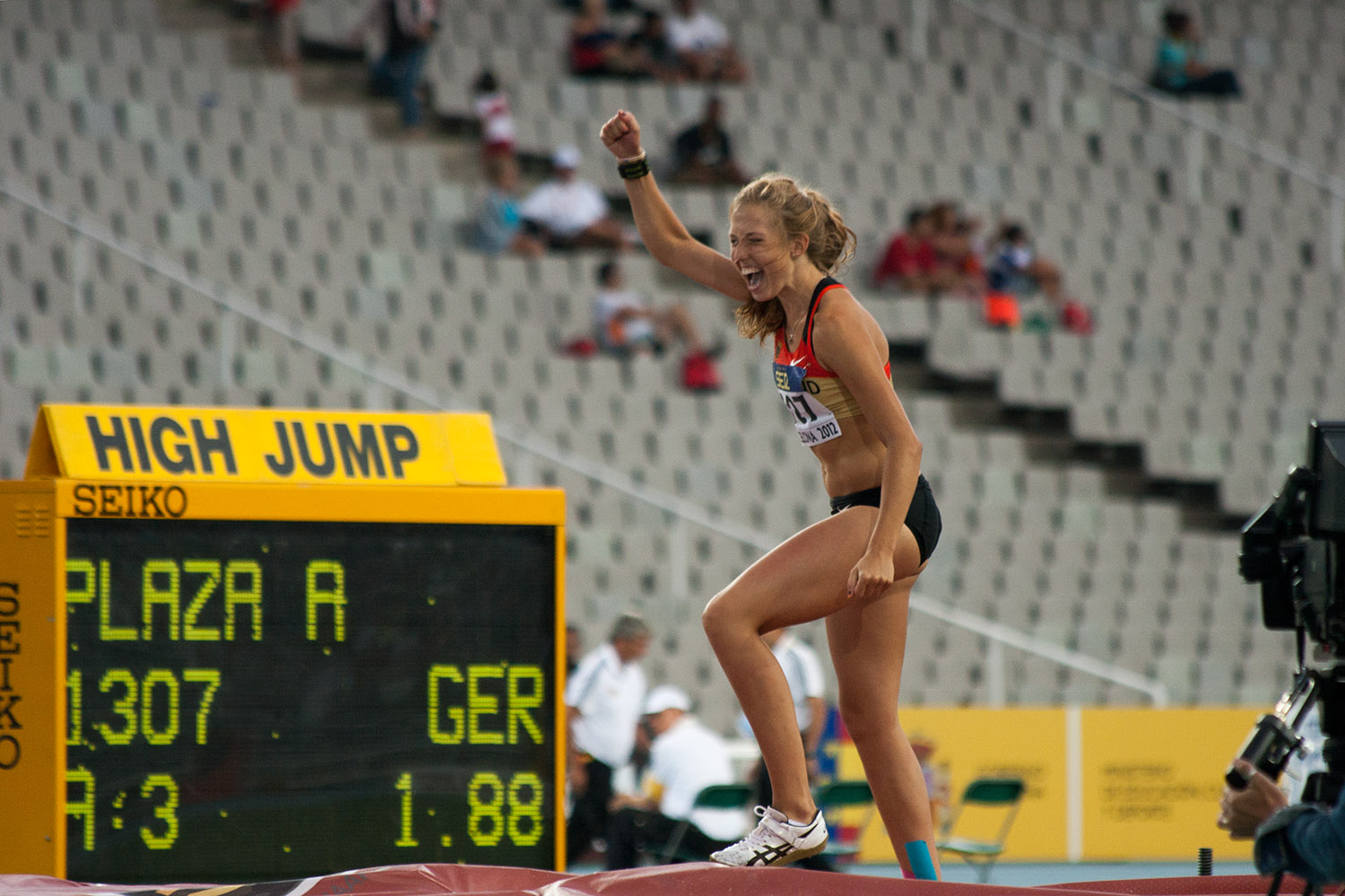 Der Moment nach der PB von 1.88